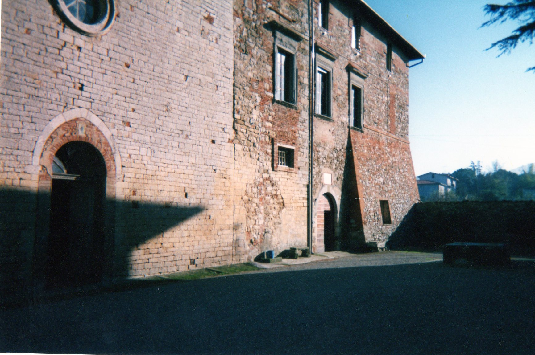 facciata dell'abbazia dei Sette Frati, a Pietrafitta (Perugia)